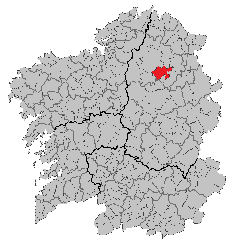 Mapa coa localización do concello de Cospeito.